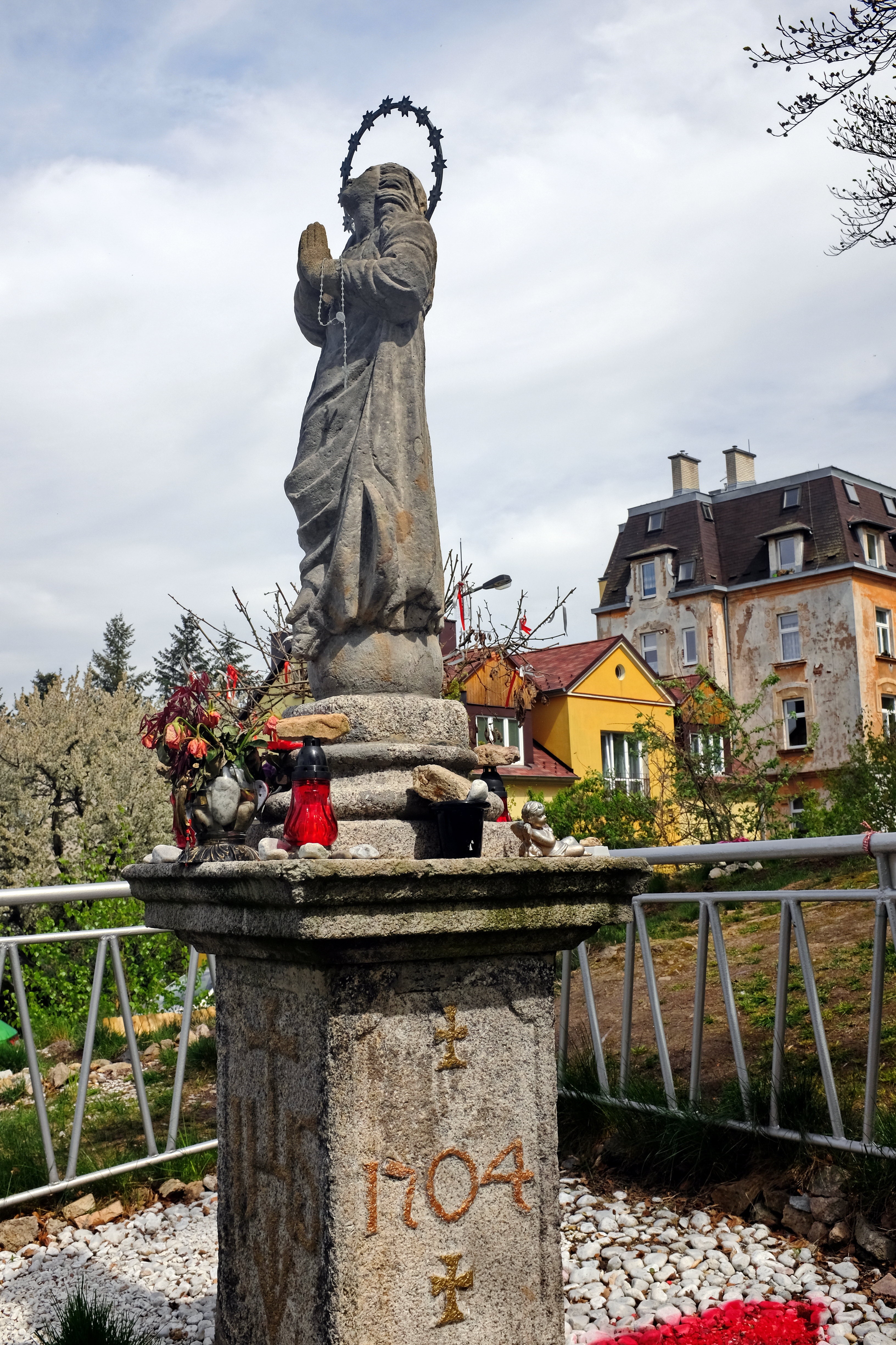 Karlovy Vary-Drahovice, socha Panny Marie